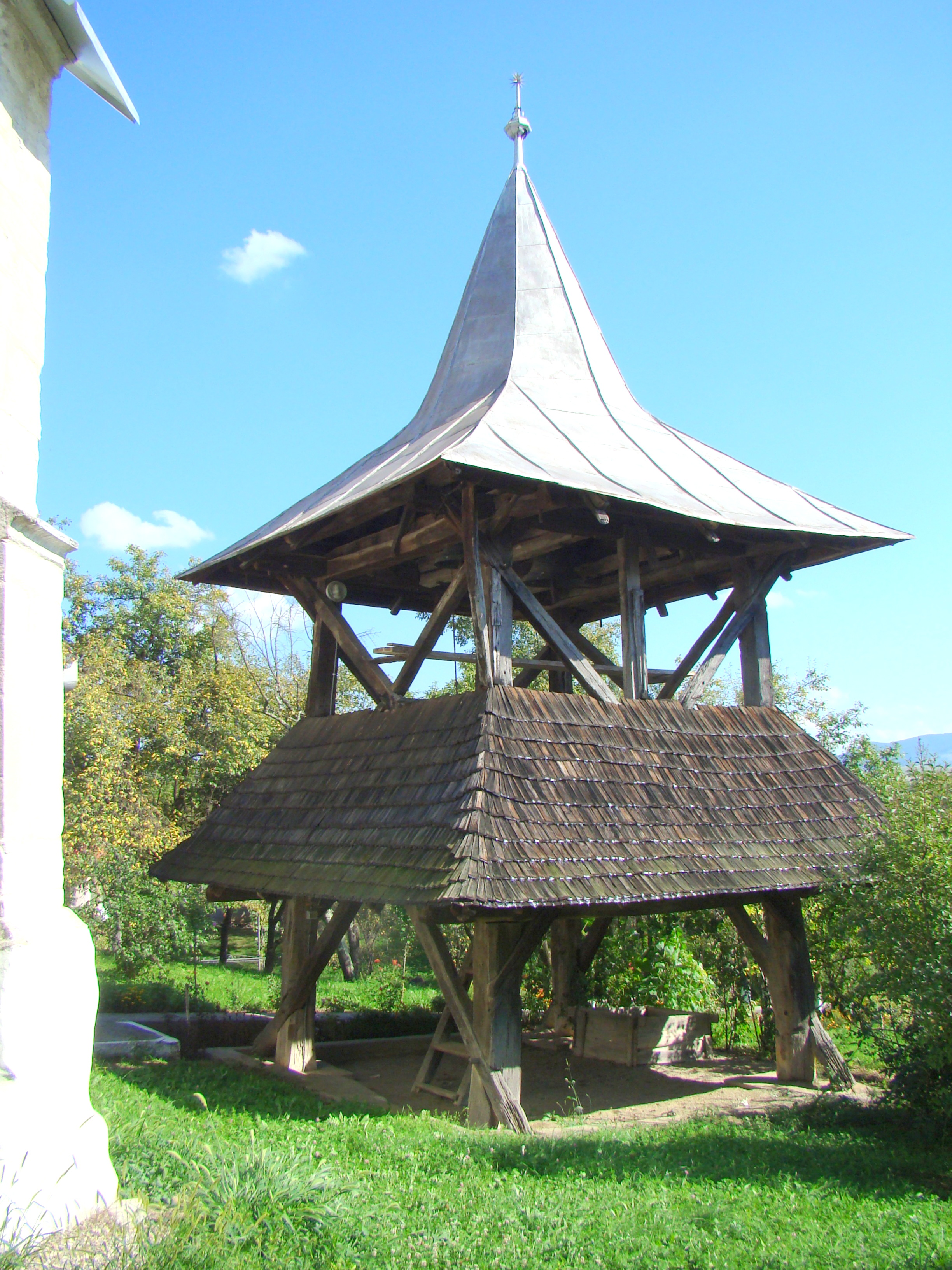 Clopotnița de lemn, sat Horoatu Crasnei; comuna Horoatu Crasnei 02